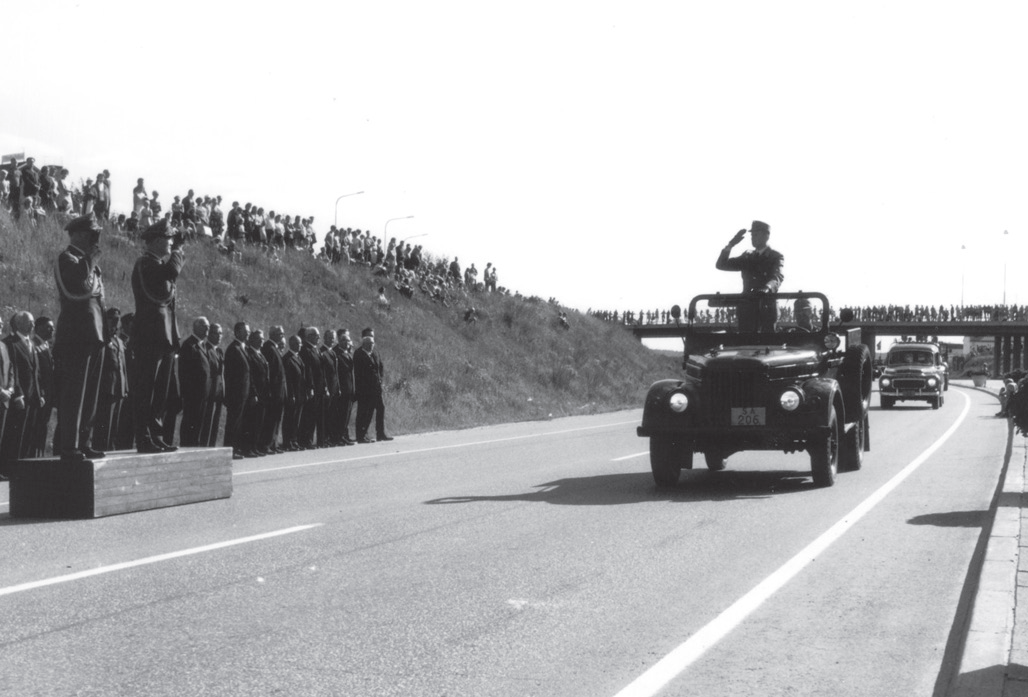 Ohimarssi nelostien montussa 1.8.1970.